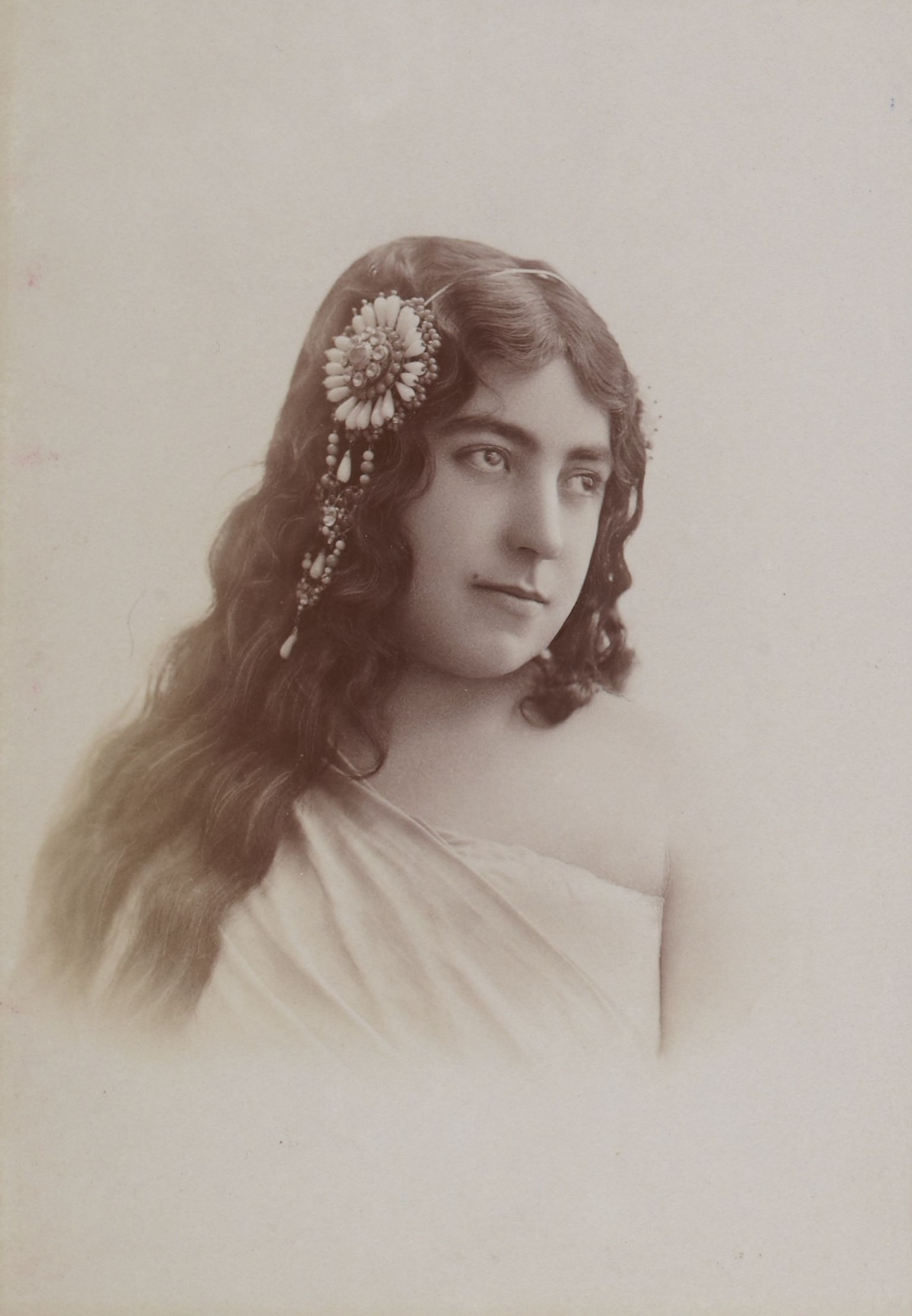 Album Reutlinger de portraits divers, vol. 2. Dauphin ; Bréjean Gravière.